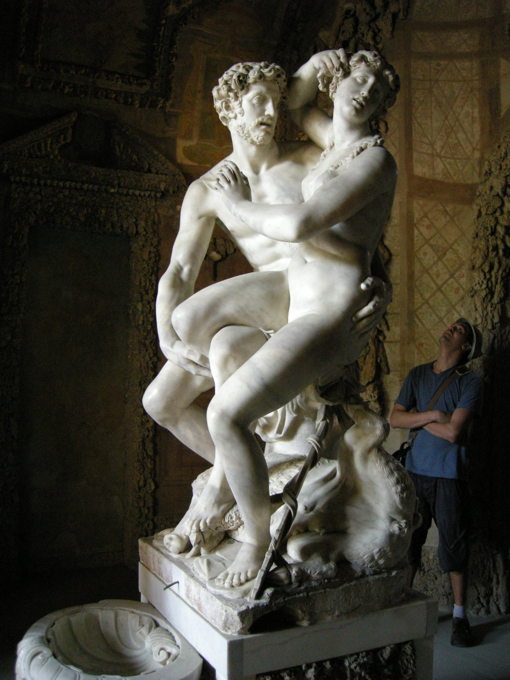 Grotta del buontalenti, Vincenzo de' Rossi, Paride che rapisce Elena